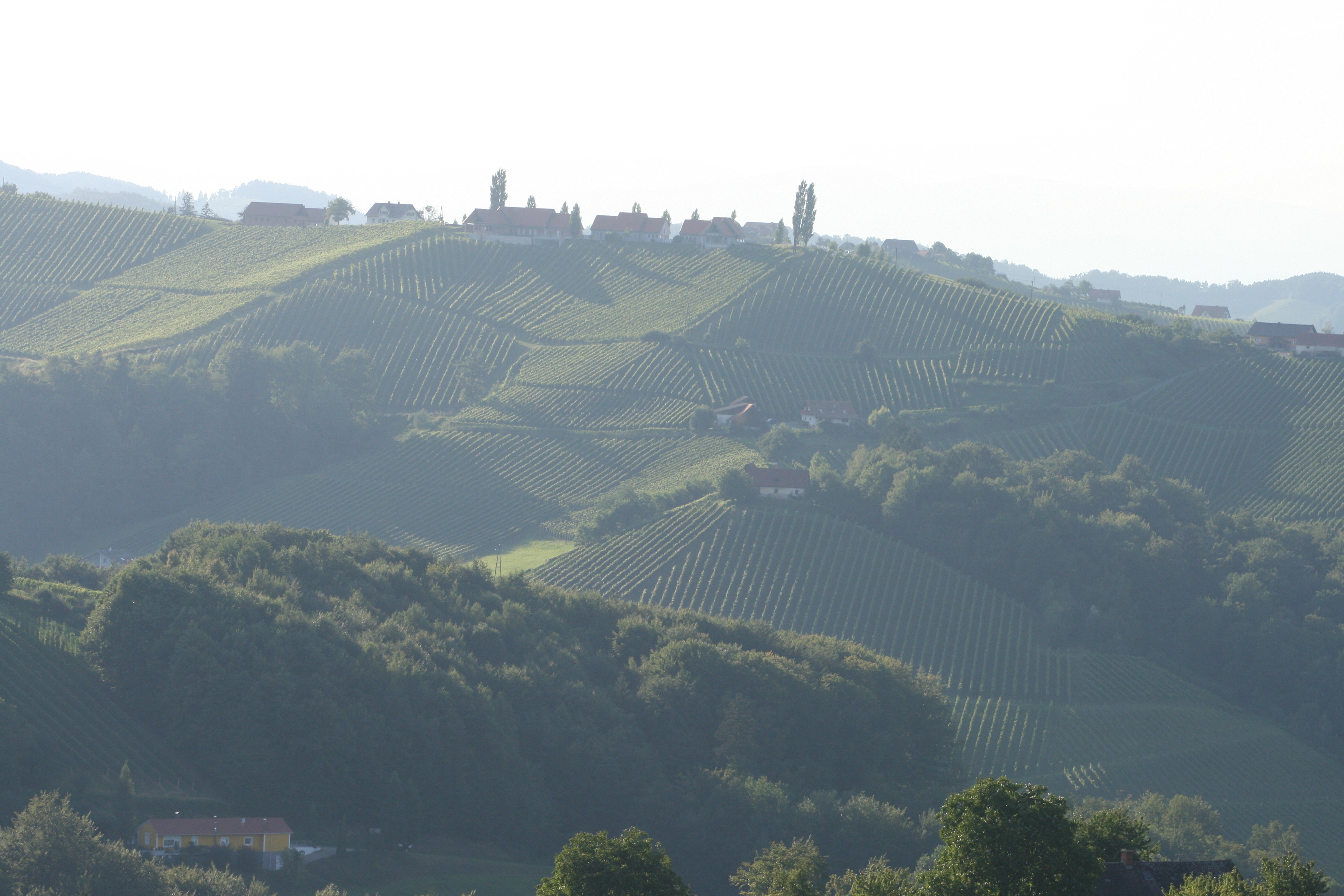 Südsteiermark